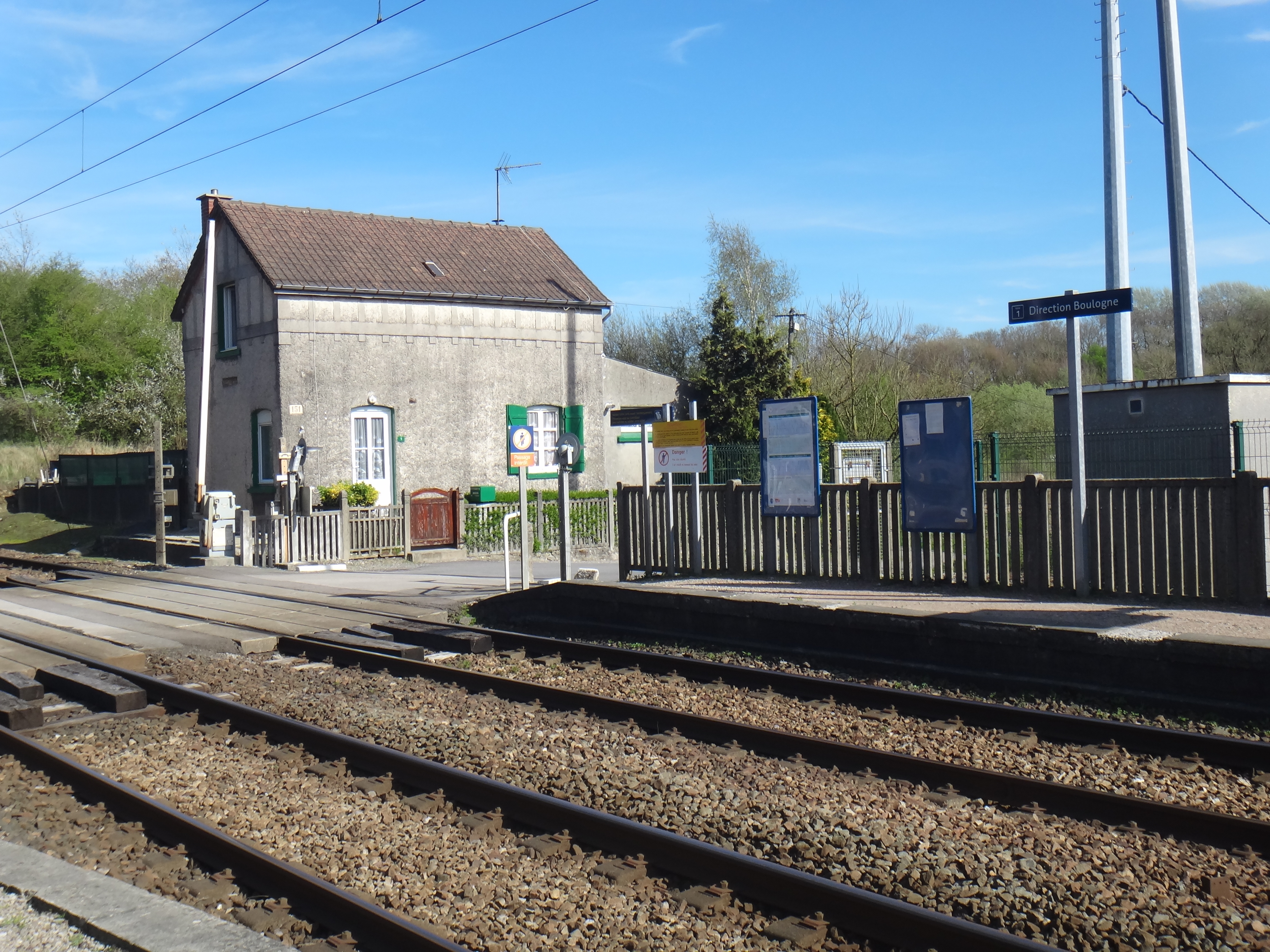 Passage à niveau de la gare du Haut-Banc, à Ferques, Pas-de-Calais, France, en 2014